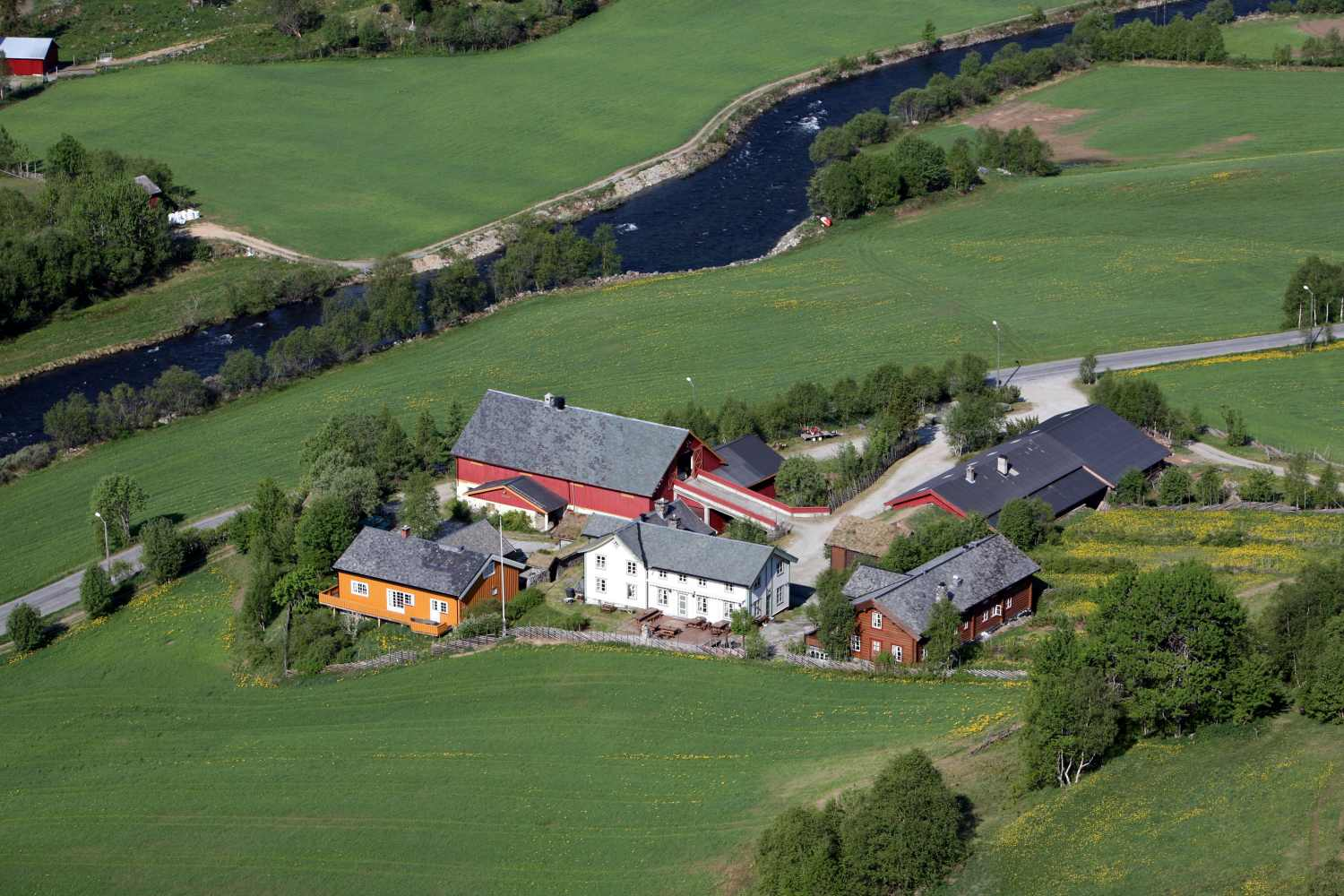 Flyfoto over Fausko Skysstasjon, tatt i 2008.